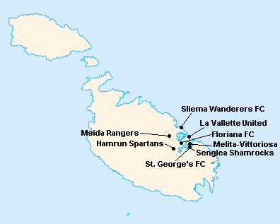 Répartition des clubs en First Division Maltaise 1912-1913.